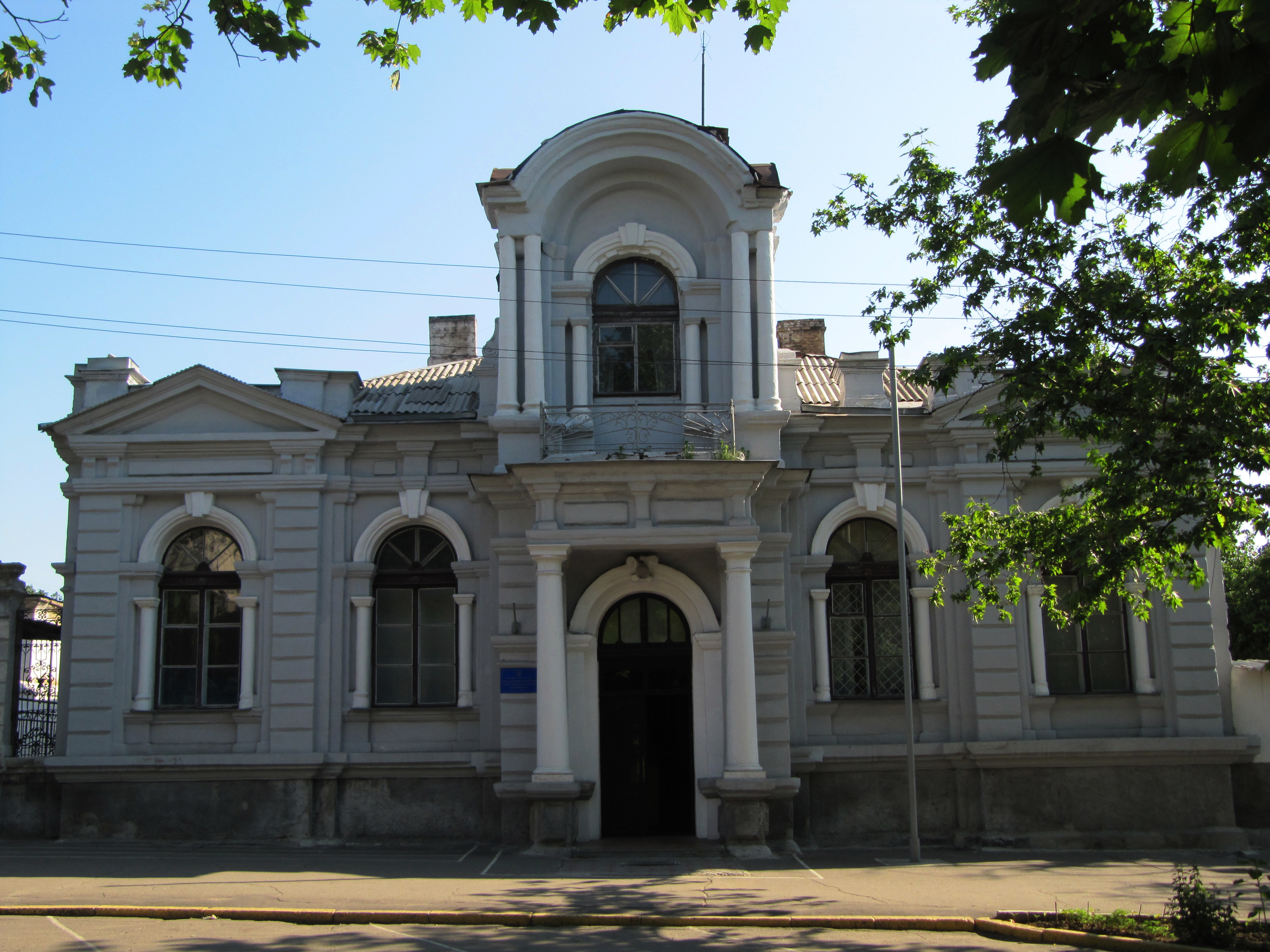 Військова комендатура (колишня церква старообрядців), м.Миколаїв Миколаївська весна у Вікіпедії